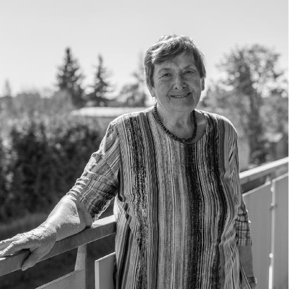 profesorka Gabriela Basařová - momentka